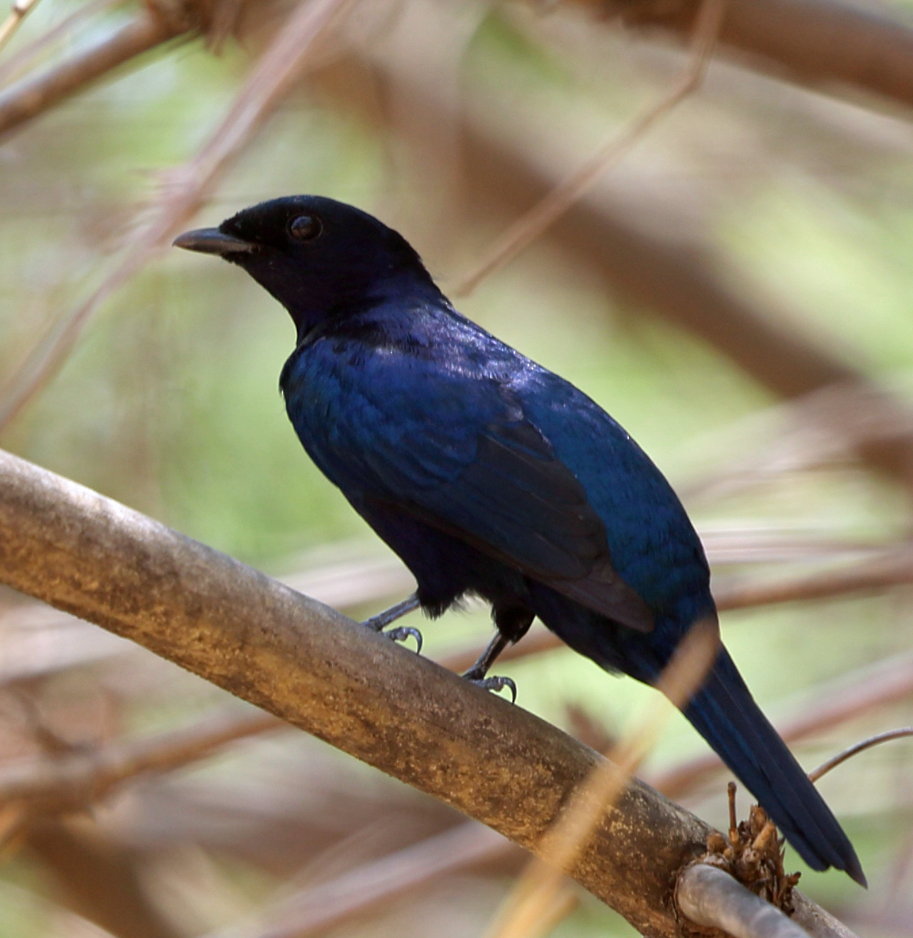 Male